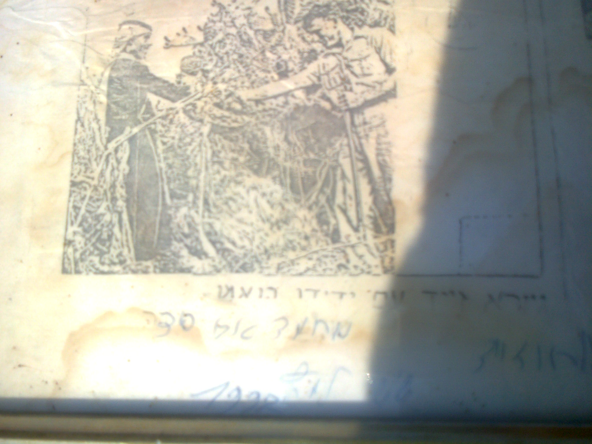 צילום ממוסגר, שצולם במצלמת טלפון סלולרי על ידי